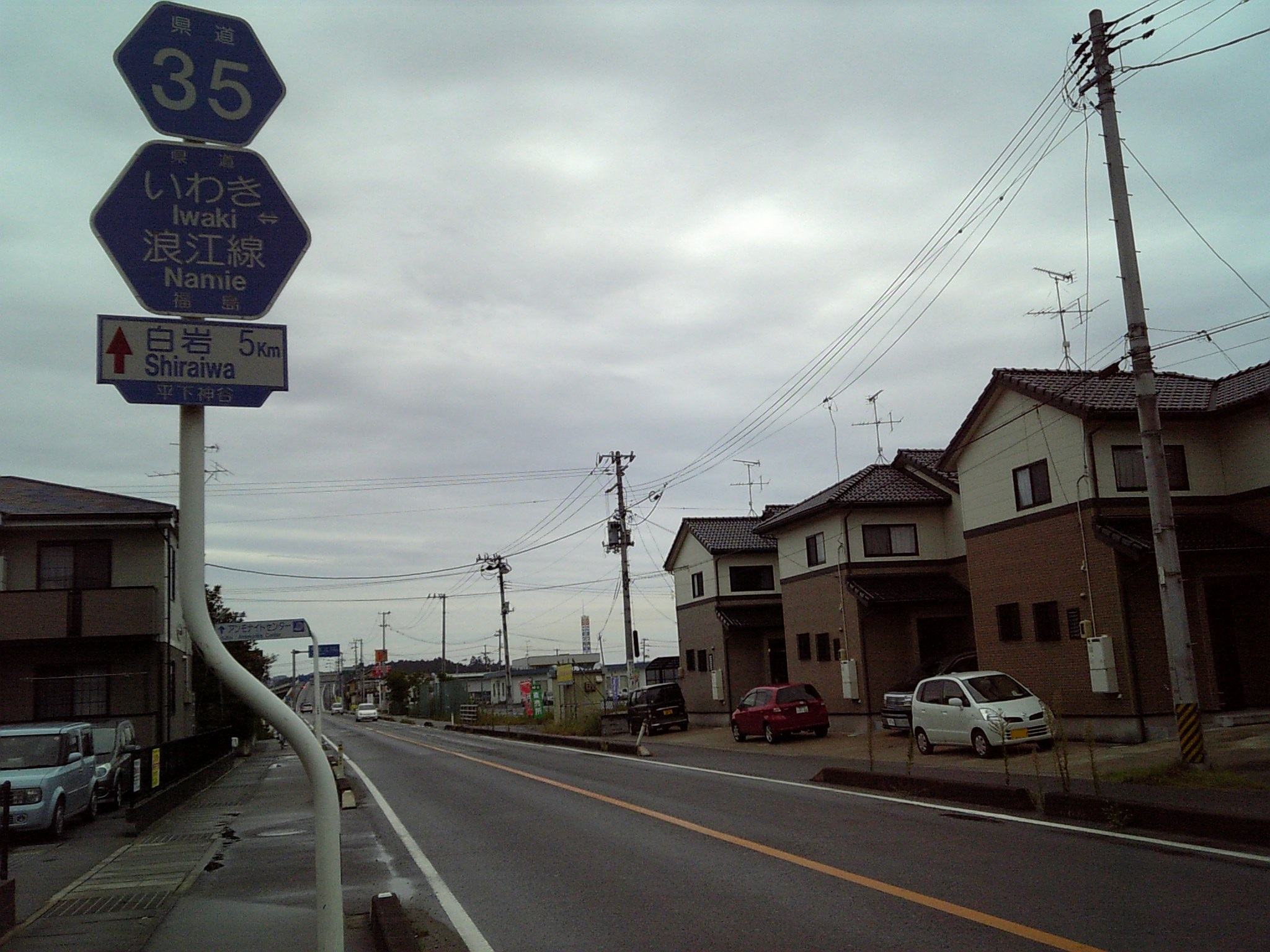 福島県道35号いわき浪江線。始点のいわき市平下神谷付近。